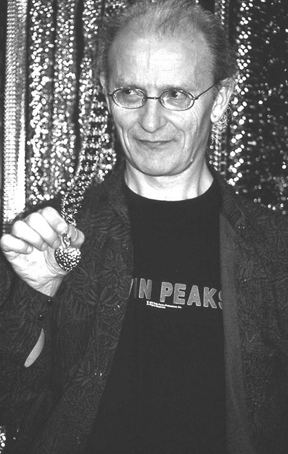 L'autore di fumetti Jean Giraud alias Moebius in una foto di Joe Zattere scattata a Lugano.